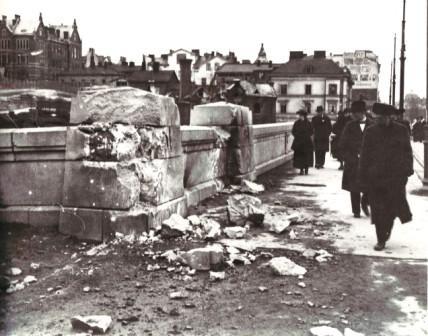 Helsingin Pitkäsilta sodan taistelujen jäljiltä vuonna 1918.